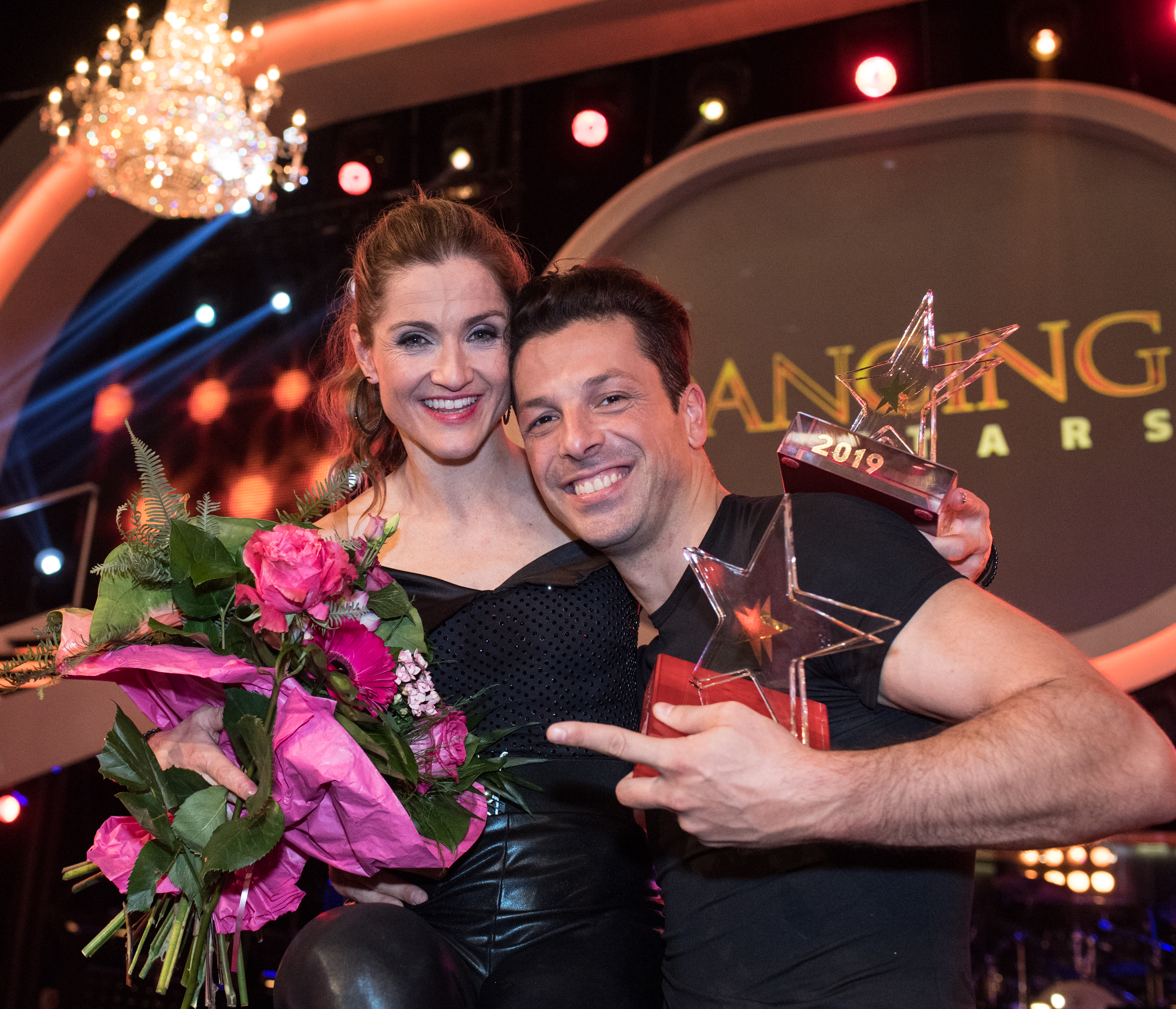 Wien, 10. Mai 2019: ORF Dancing Stars, Finale - Bild zeigt die Sieger Lizz Görgl und Thomas Kraml.